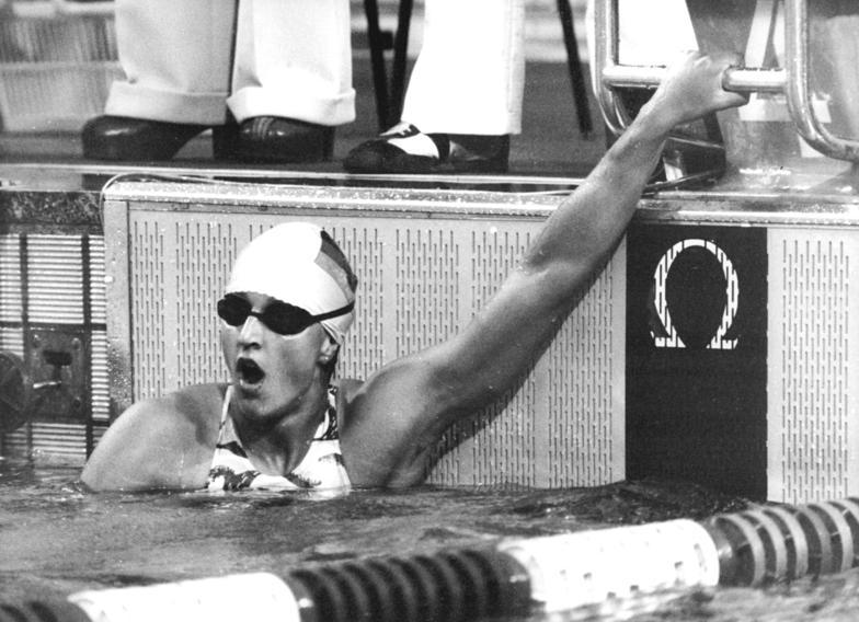 Barbara Krause ADN-ZB Link 02.07.78 Berlin: 29. DDR-Meisterschaften im Sportschwimmen- Barbara Krause schwamm Weltrekord- Der erste Blick von Barbara Krause (SC Dynamo Berlin) nach dem Anschlag im 200-m-Freistilfinale gilt der Anzeigetafel. Dort leuchtet mit 1:59,04 min eine neue Weltrekordzeit auf.